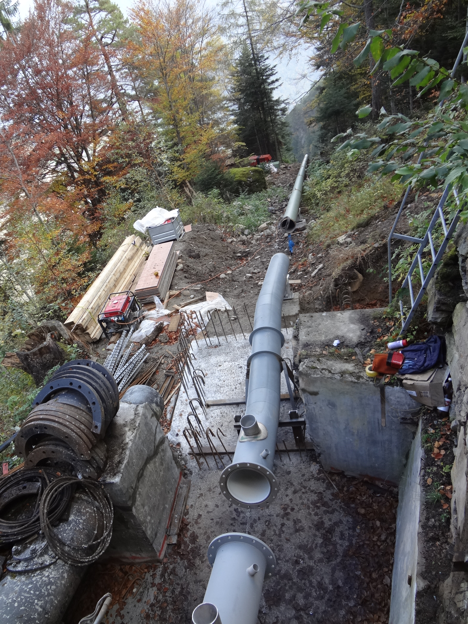 Captage des eaux de la Salanfe à Salvan pour l'aménagement hydroélectrique de la Pissevache à Vernayaz. Chantier de rénovation en 2015.